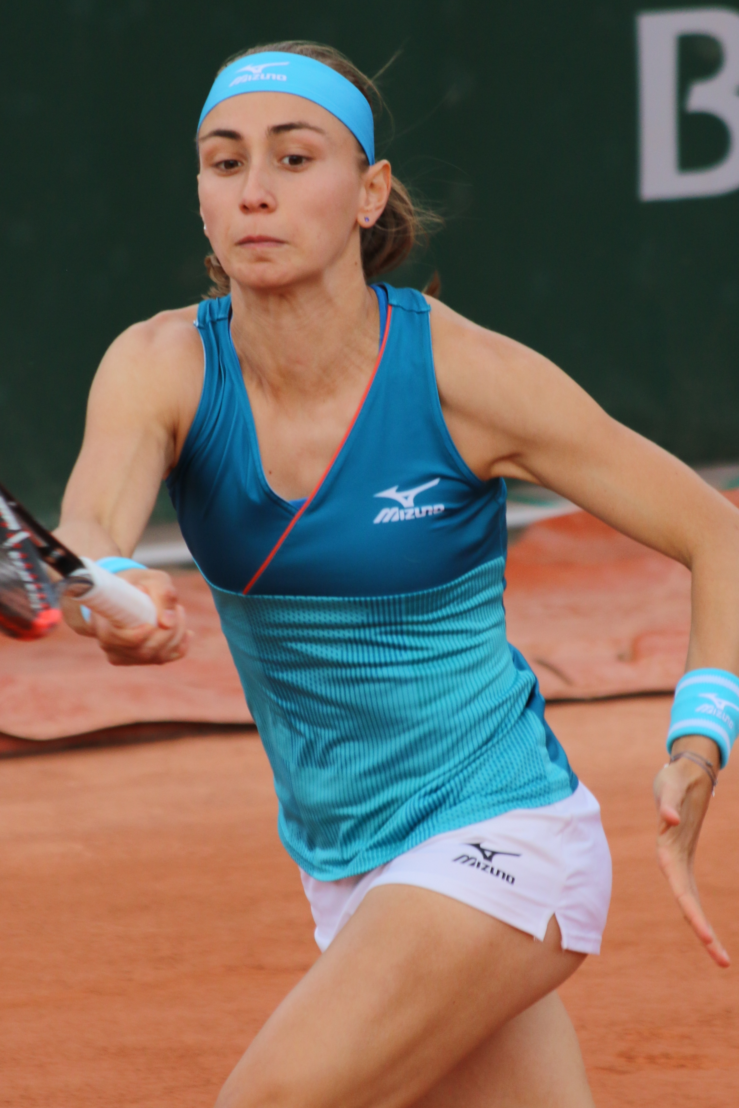 Krunic RG19 (9)